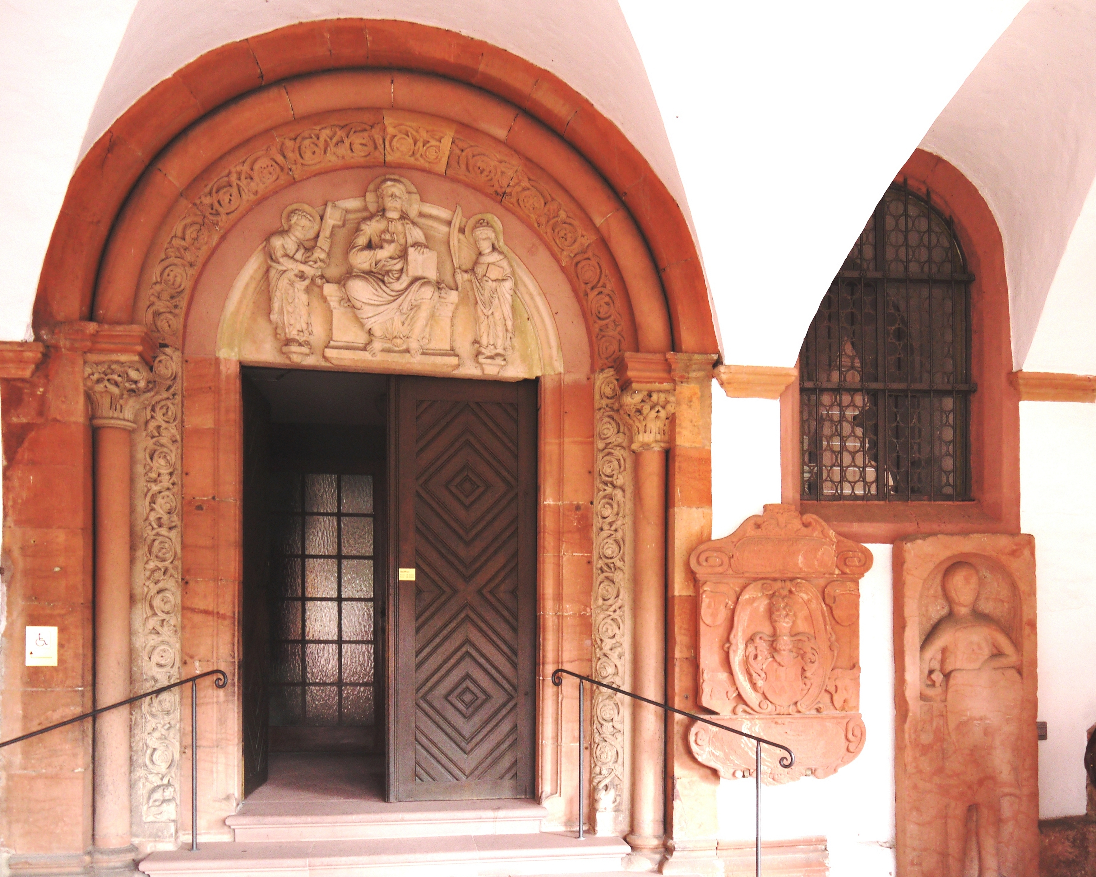 Portal der Stiftskirche St. Peter und Alexander in Aschaffenburg